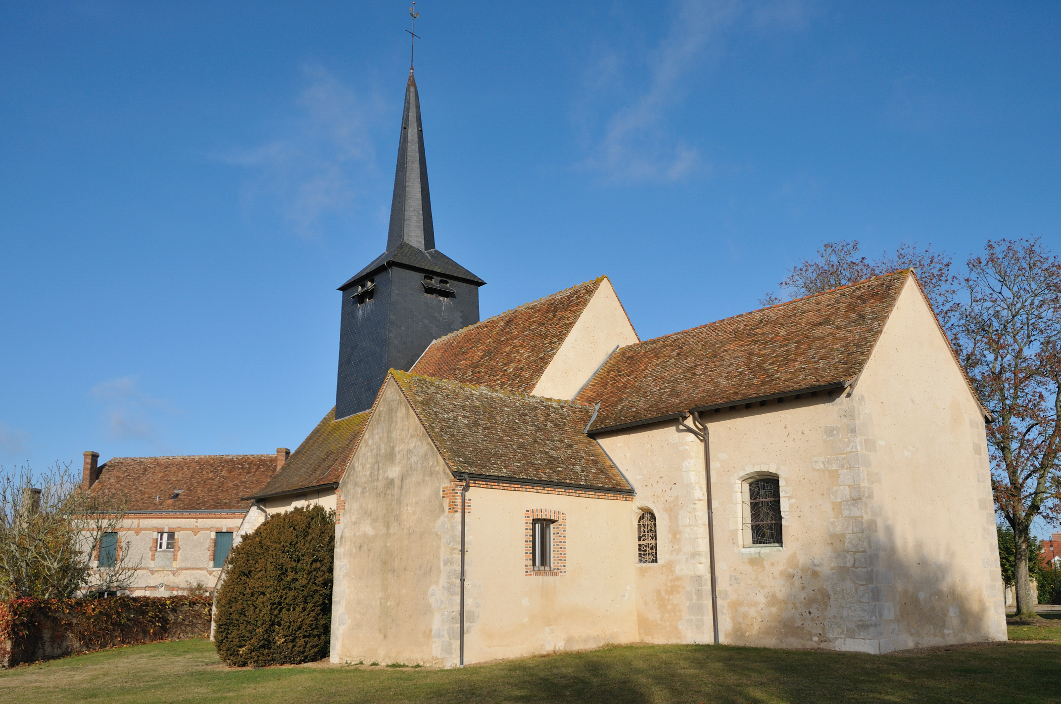 Église Saint-Étienne, Lion-en-Sullias, France